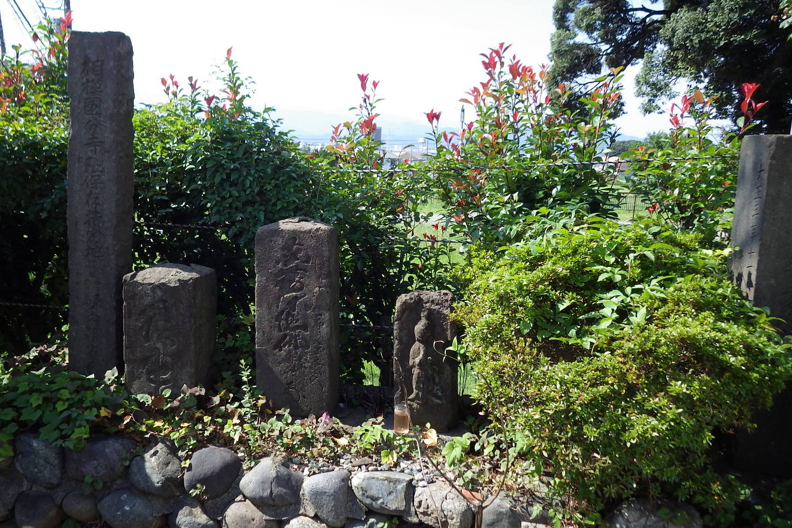 国分宿の辻の石塔群